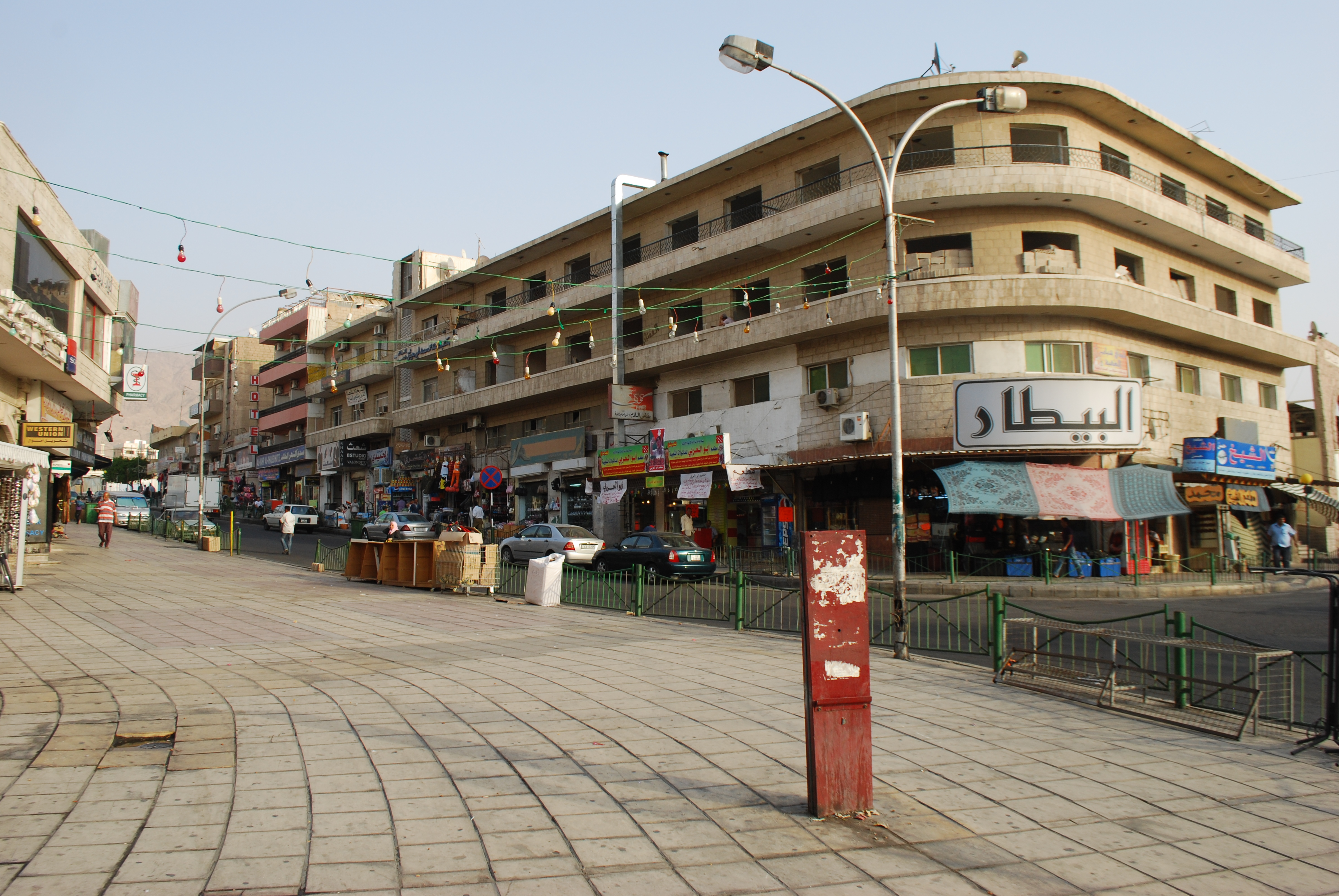 Aqaba : le quartier commerçant près du boulevard côtier.